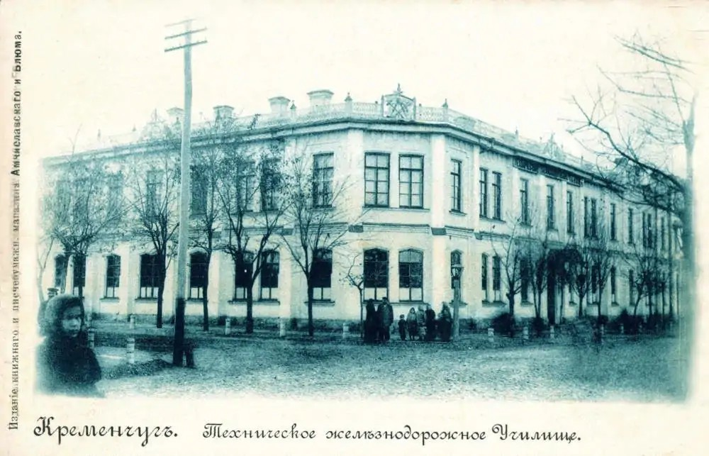 Postcards of old Kremenchuk. Технічне залізничне училище.